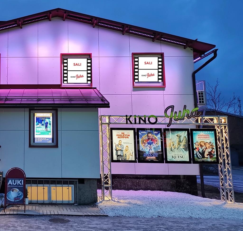 Elokuvatetateri Kino Juha. Nurmijärvi 2020.